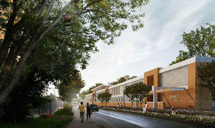 Проект школы, совмещённой с детским садом, утверждённый Москомархитектурой для строительства в Свиблове на берегу Яузы